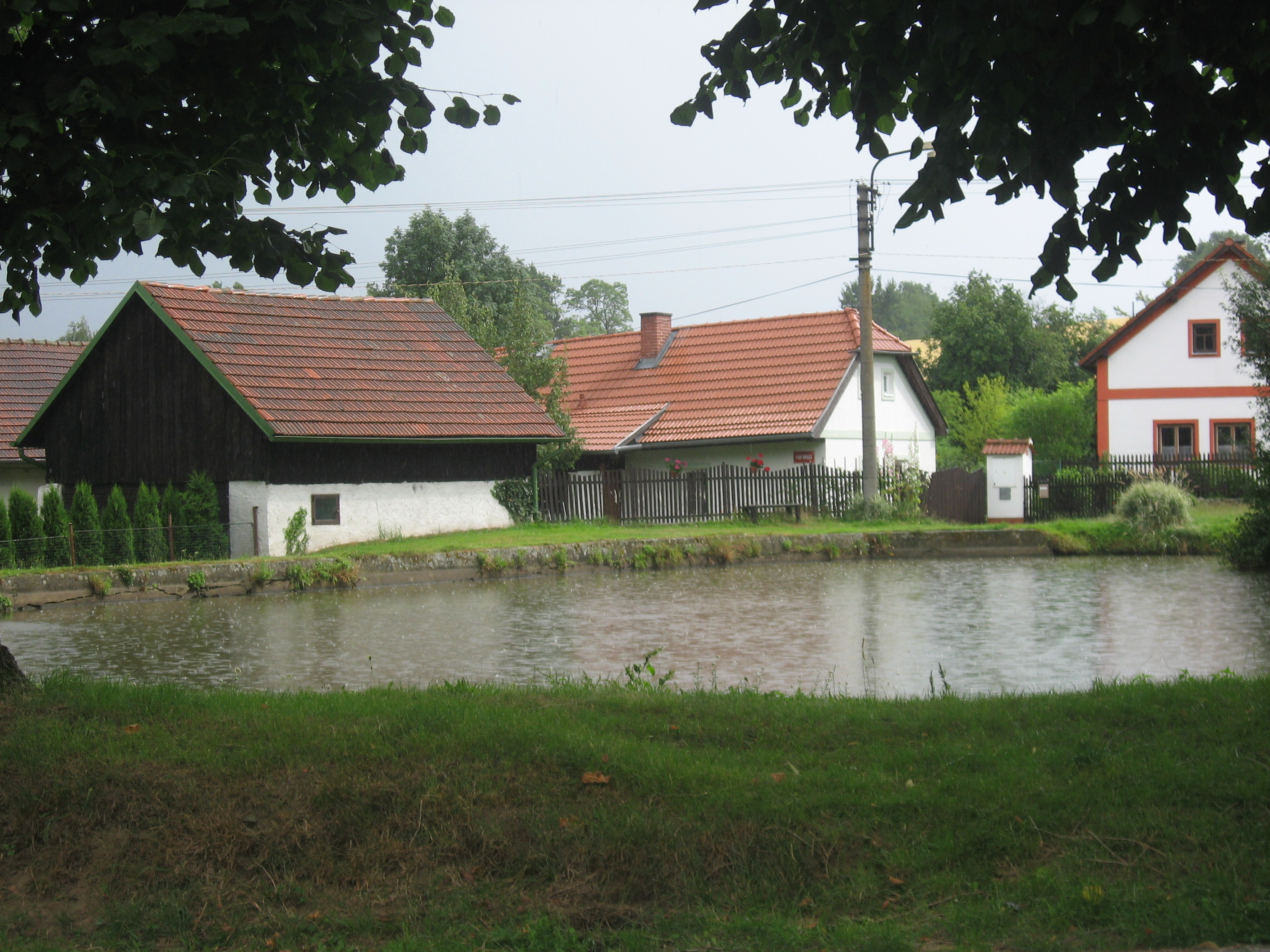 Sedlice, rybníček